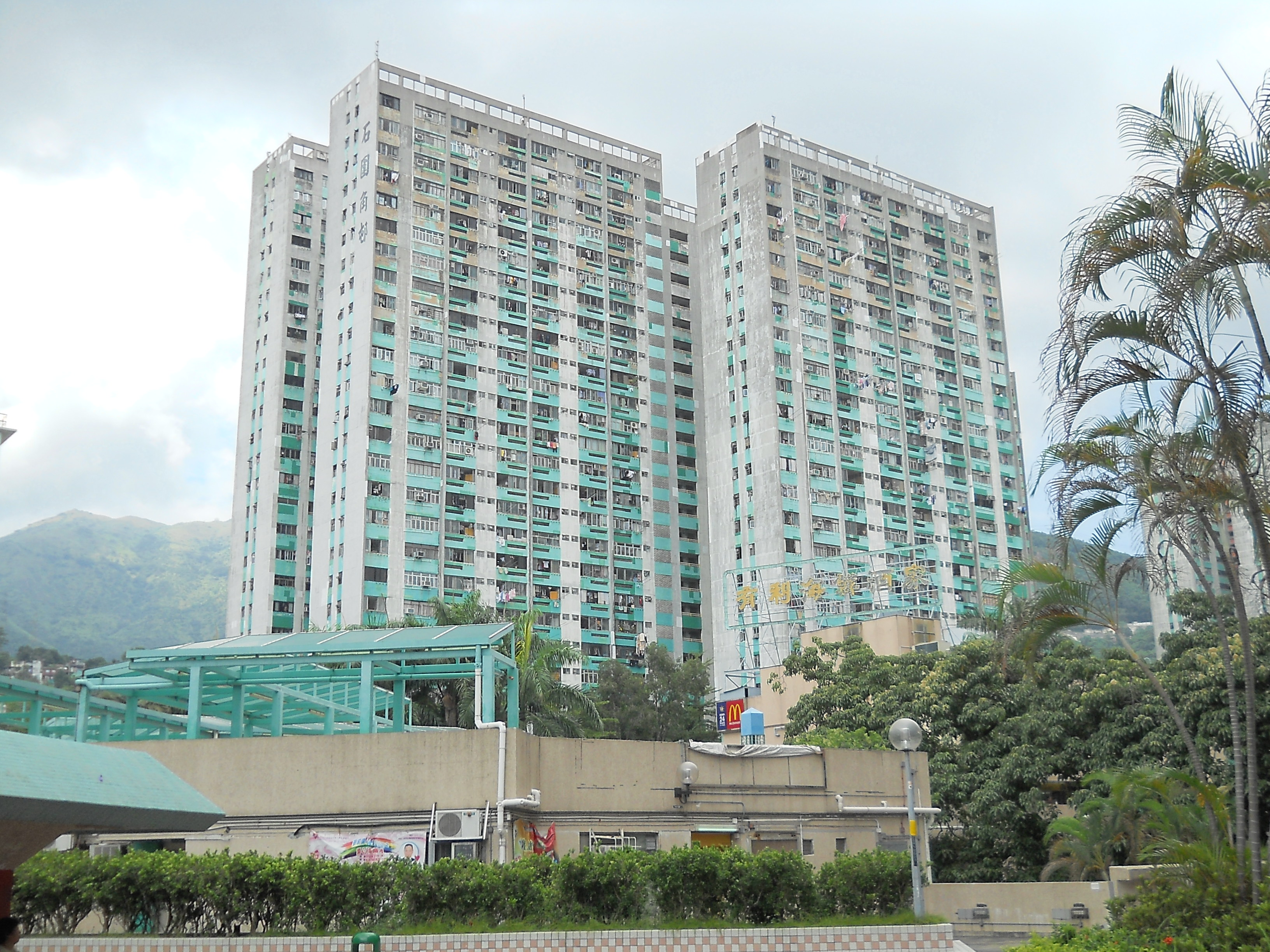 中文（香港）: 石圍角邨